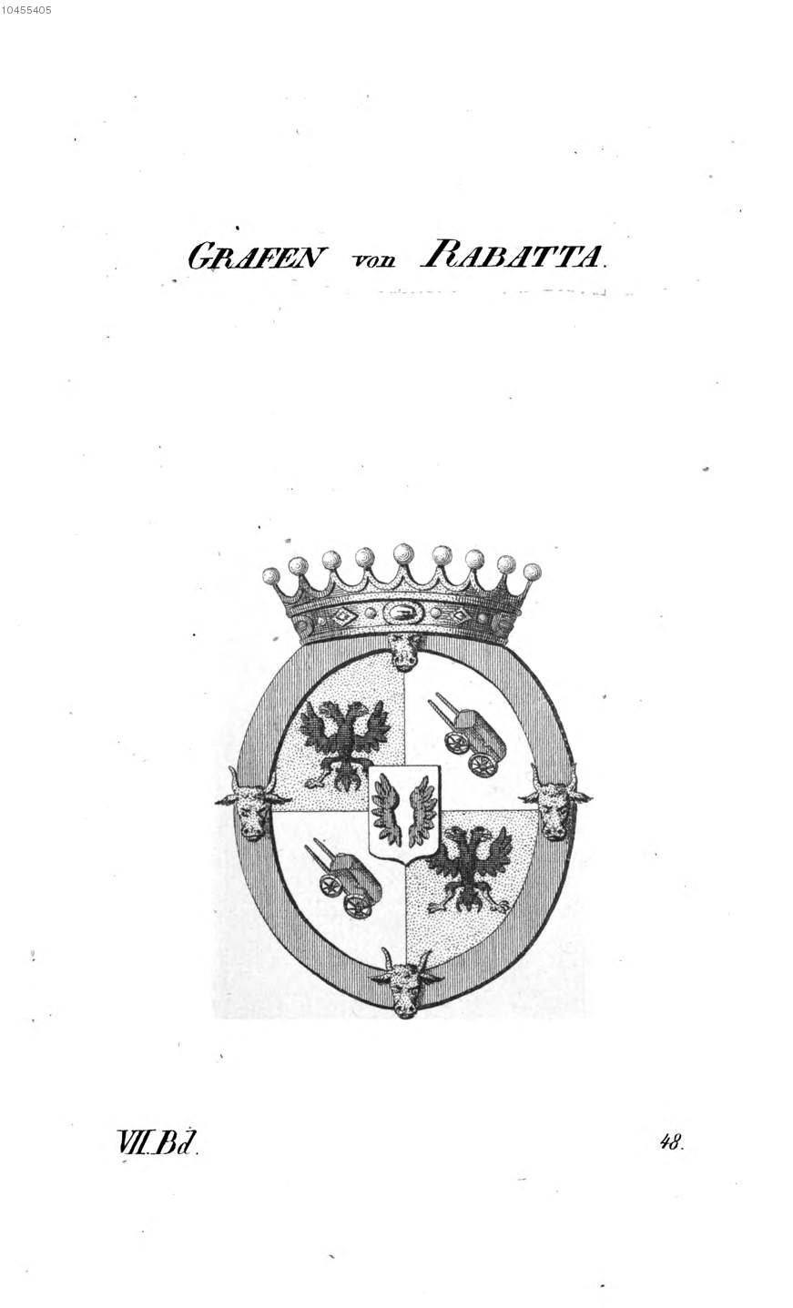 Wappen Rabatta - Tyroff AT.jpg